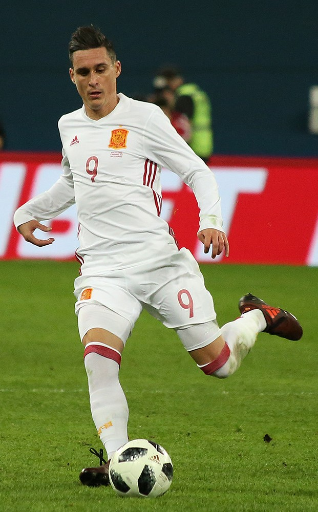 José Callejón